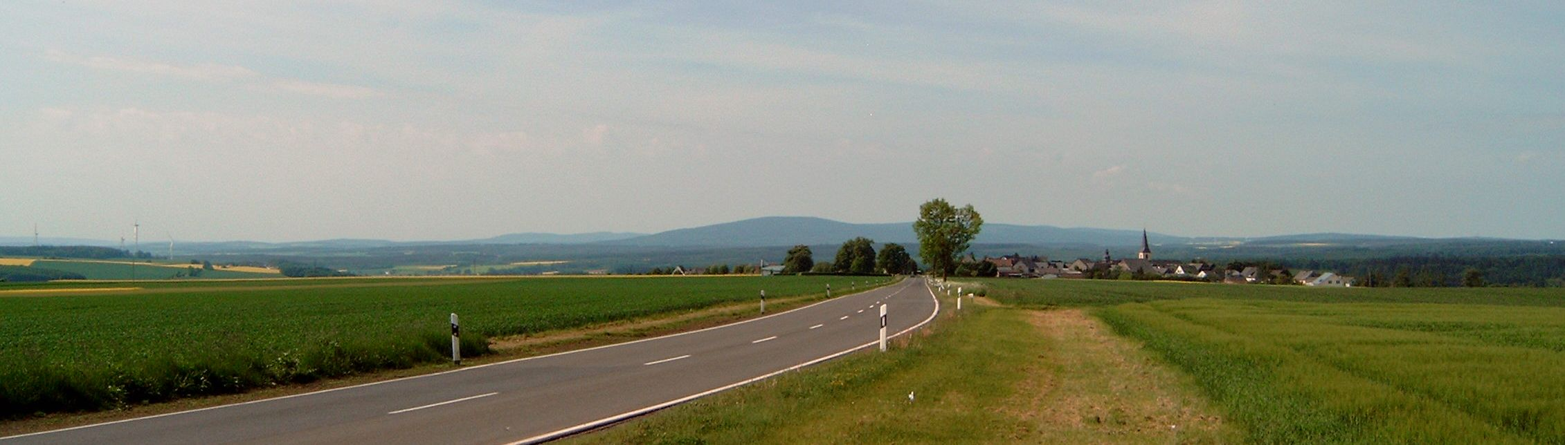 Hunsrücklandschaft; die Hunsrückhöhenstraße, rechts der Ort Kappel, im Hintergerund der Idarkopf.